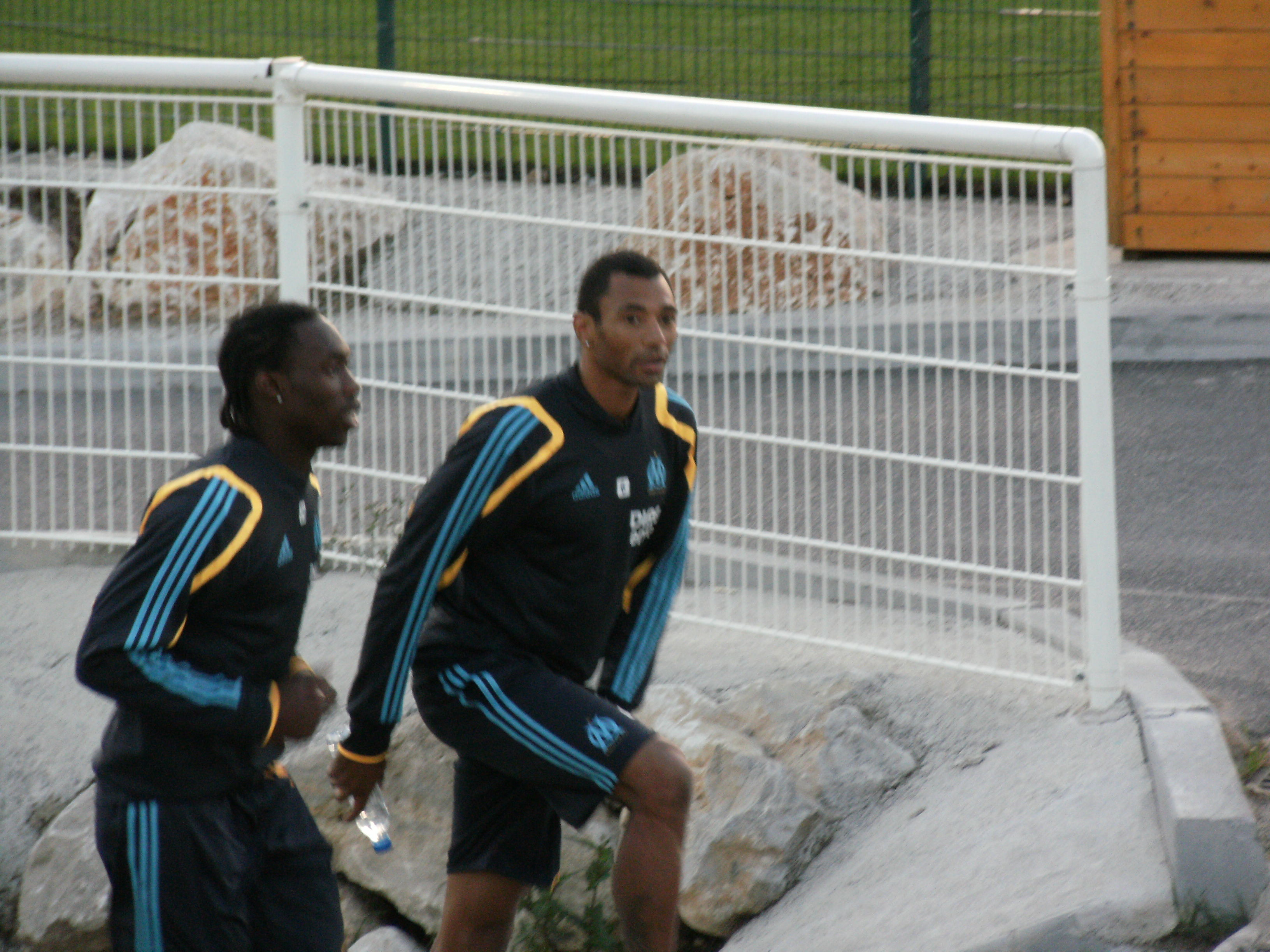 Edouard Cissé au centre d'entraînement Robert Louis-Dreyfus, au côté de Guy Gnabouyou